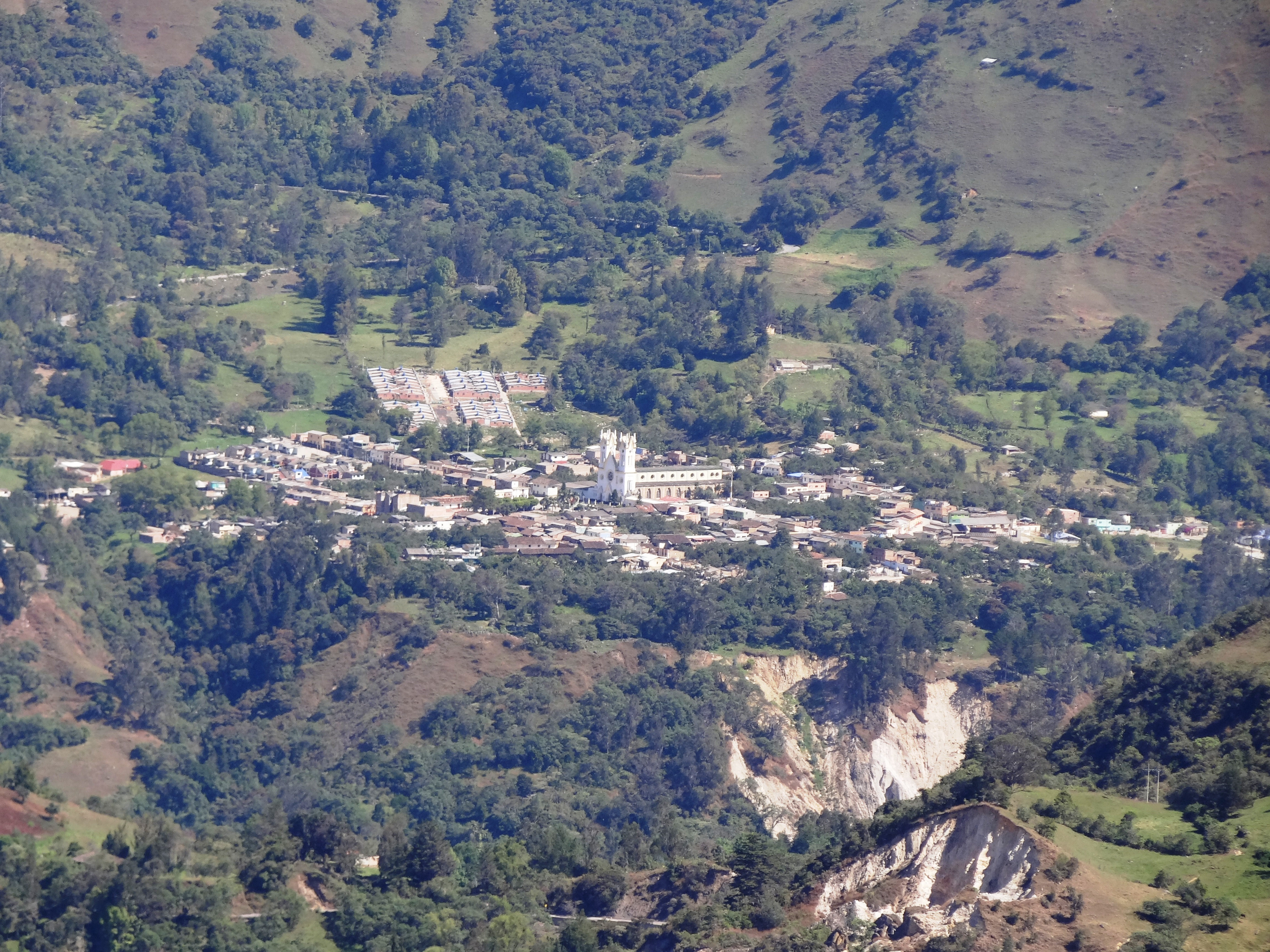 Área urbana del municipio de San Mateo, departamento de Boyacá, Colombia